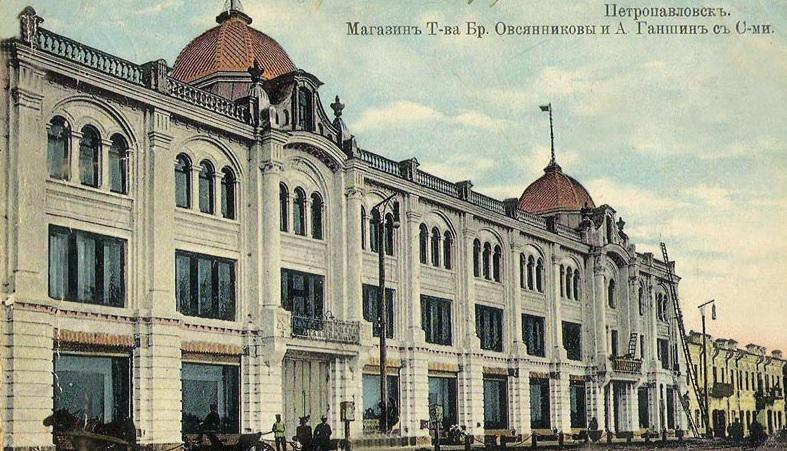 Магазин Товарищества Овсянниковых и Ганшиных в Петропавловске, Российская империя.